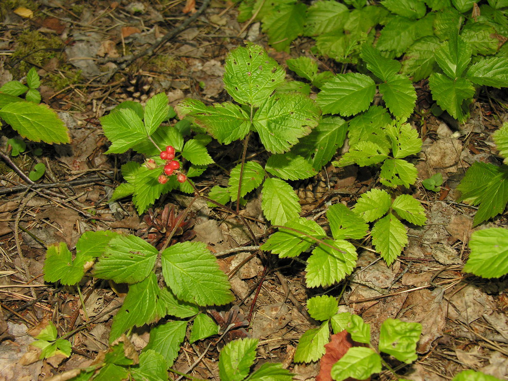 Paprastoji katuogė (Rubus saxatilis) Šeima. Erškėtiniai (Rosaceae) Foto: Algirdas, 2006 m. liepos 25 d., Lietuva